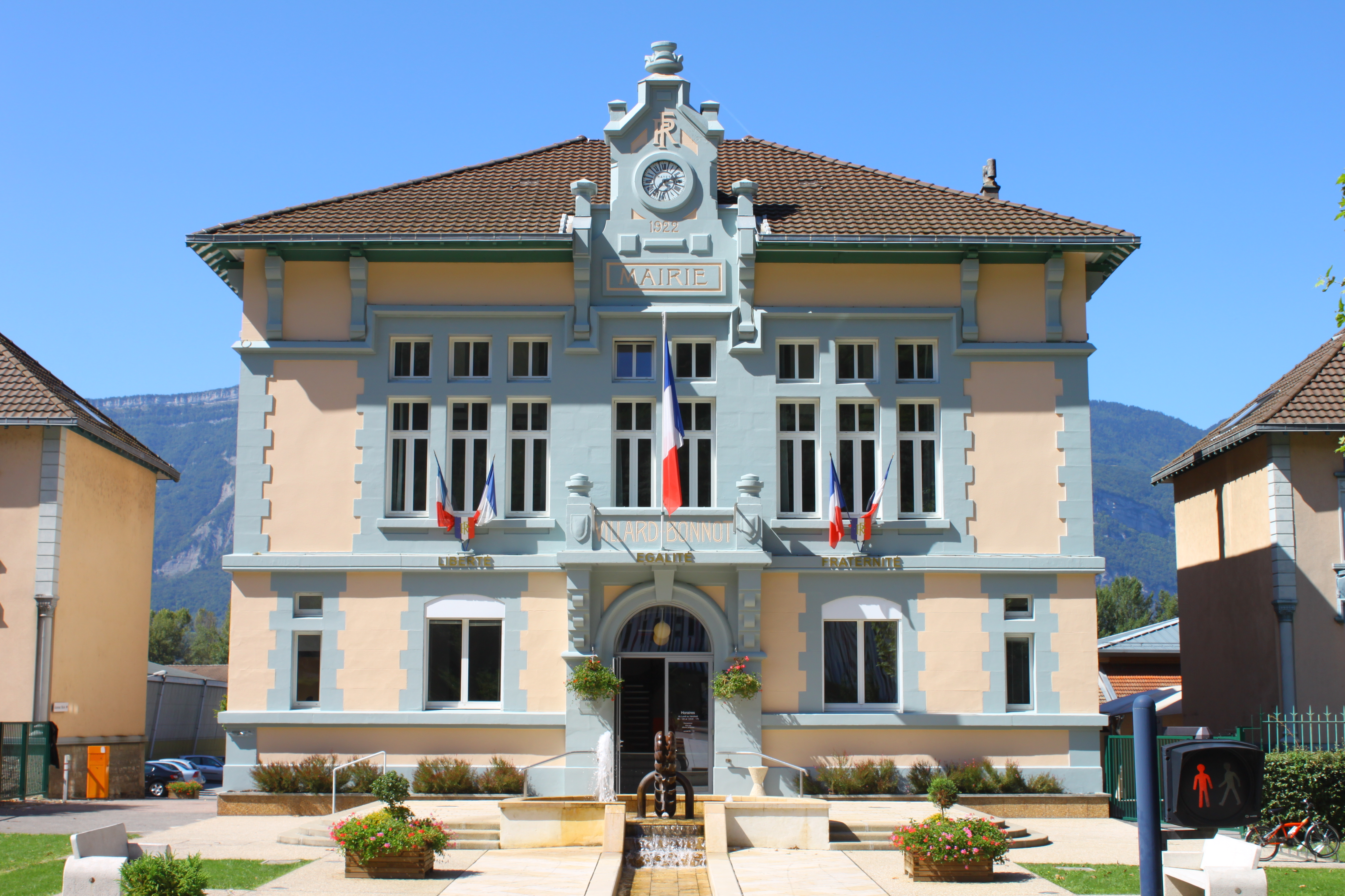 Mairie de Villard-Bonnot en 2011